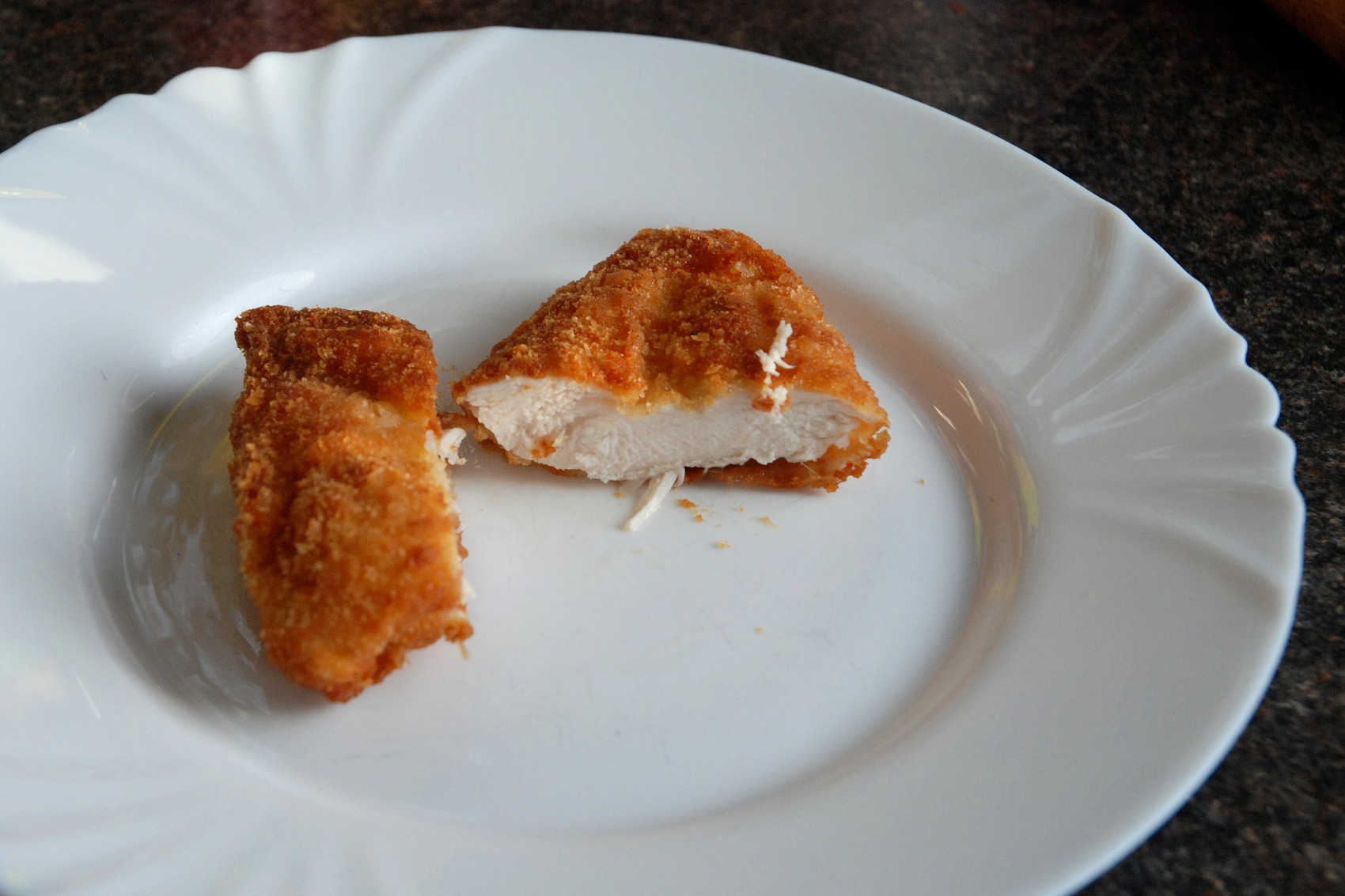 Rozkrojený kuřecí řízek